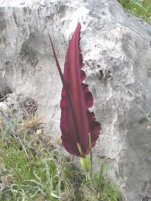 Dracunculus vulgaris; de: Gemeine Drachenwurz